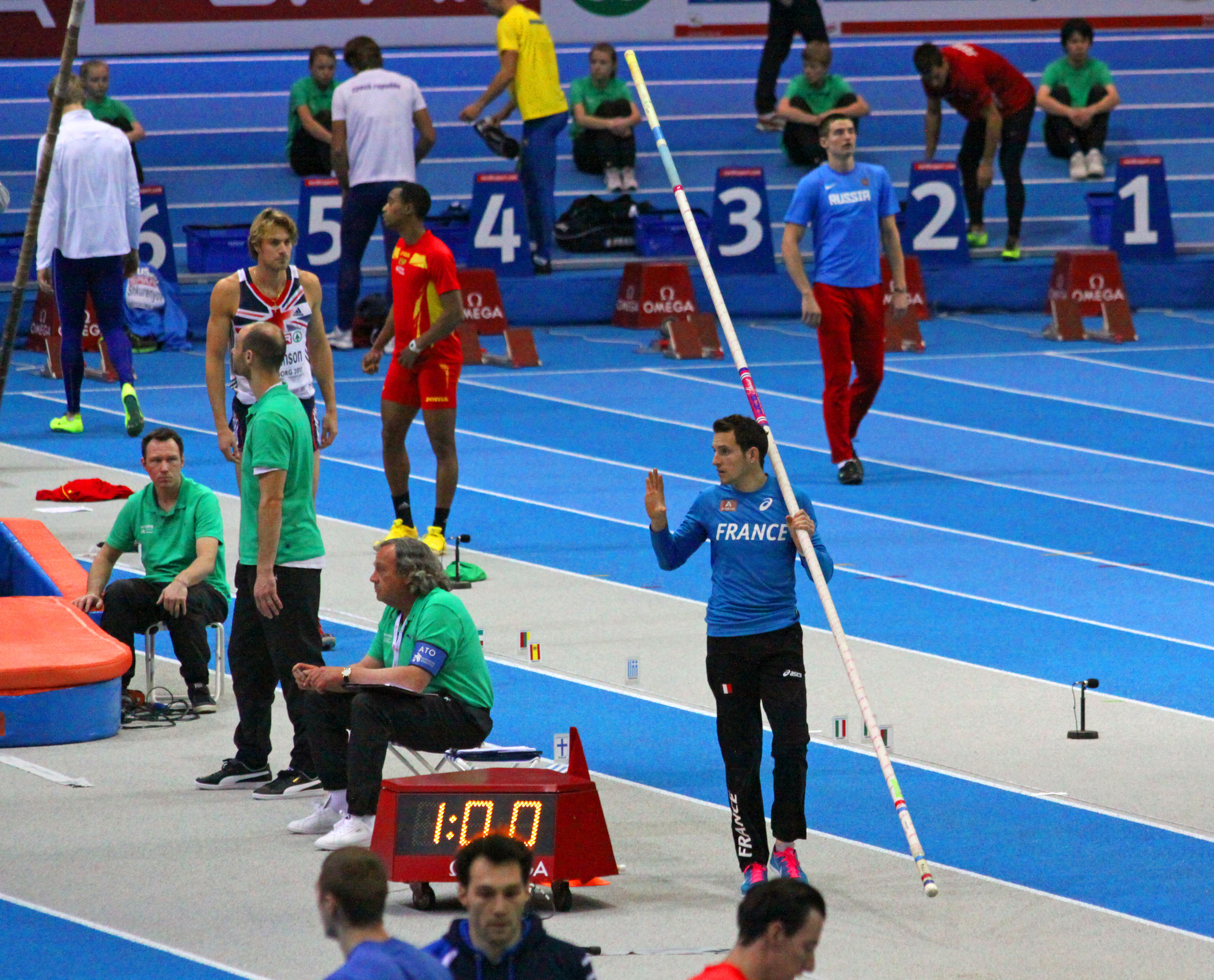 Göteborg. Renaud Lavillénie aux championnats d'Europe en salle.